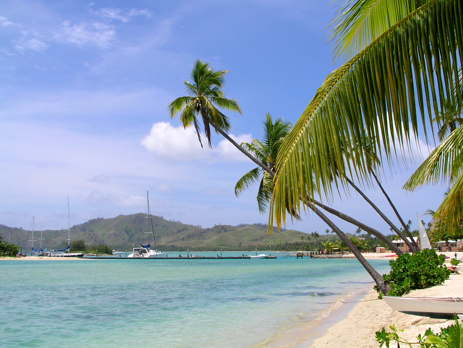 Malolo Lailai, Mamanucas - Fiji